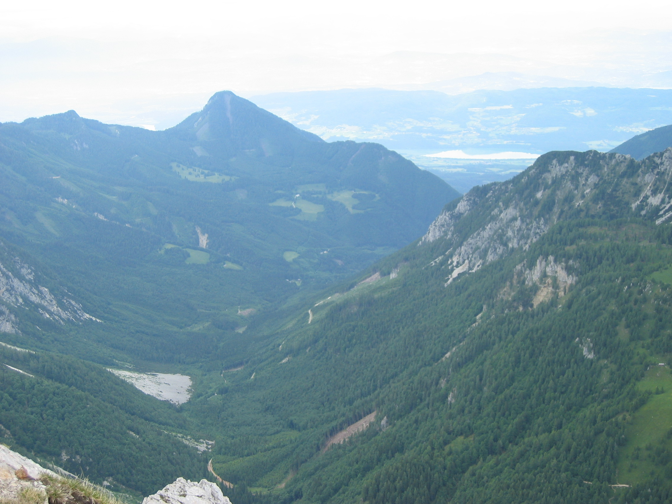 Das Kärntner Bärental vom Hochstuhl aus gesehen. Im Hintergrund der Matschacher Gupf. Foto: E. Pirker